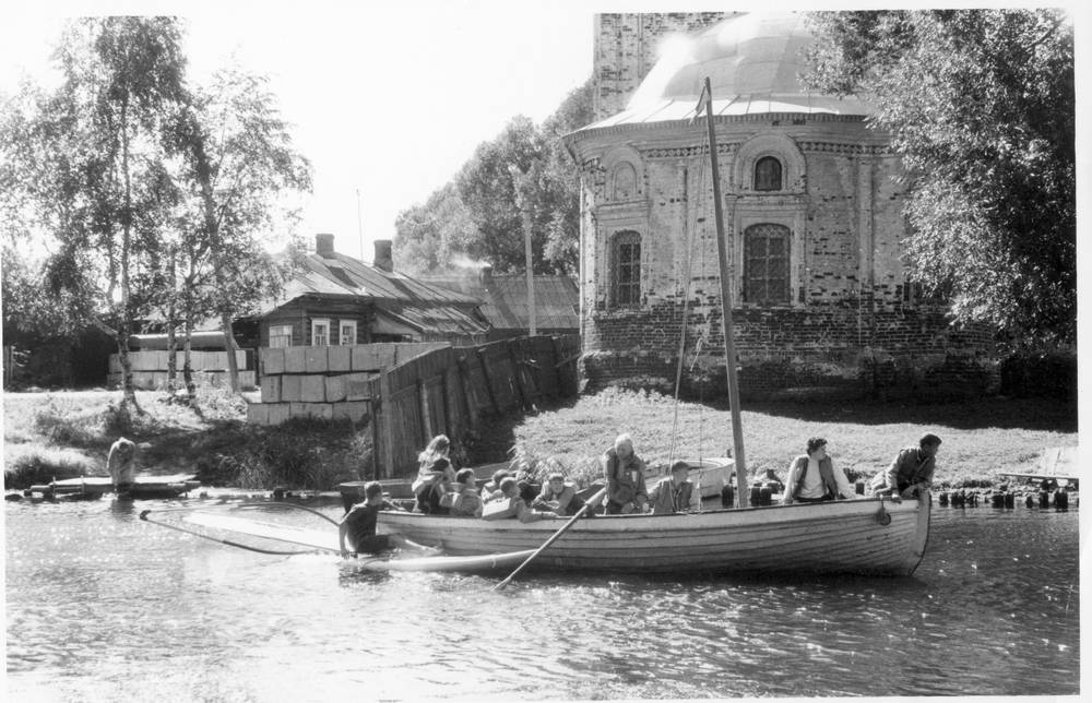 Воспитанники Клуба юных моряков выходят на озеро через устье реки Трубеж около церкви Сорока мучеников в городе Переславле. Возле кормы серфер с парусной доской.